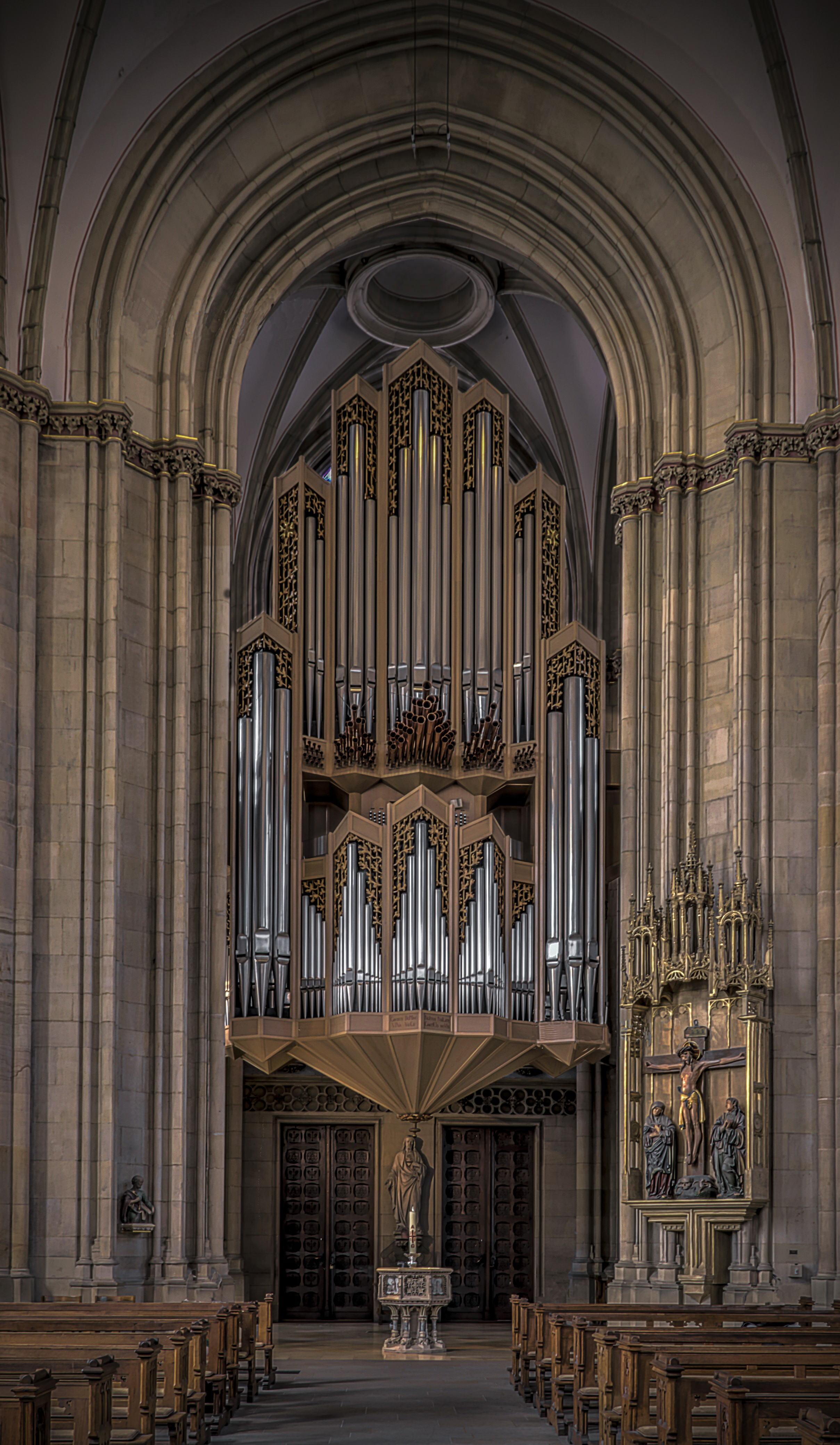 St. Lamberti -Münster - Orgel